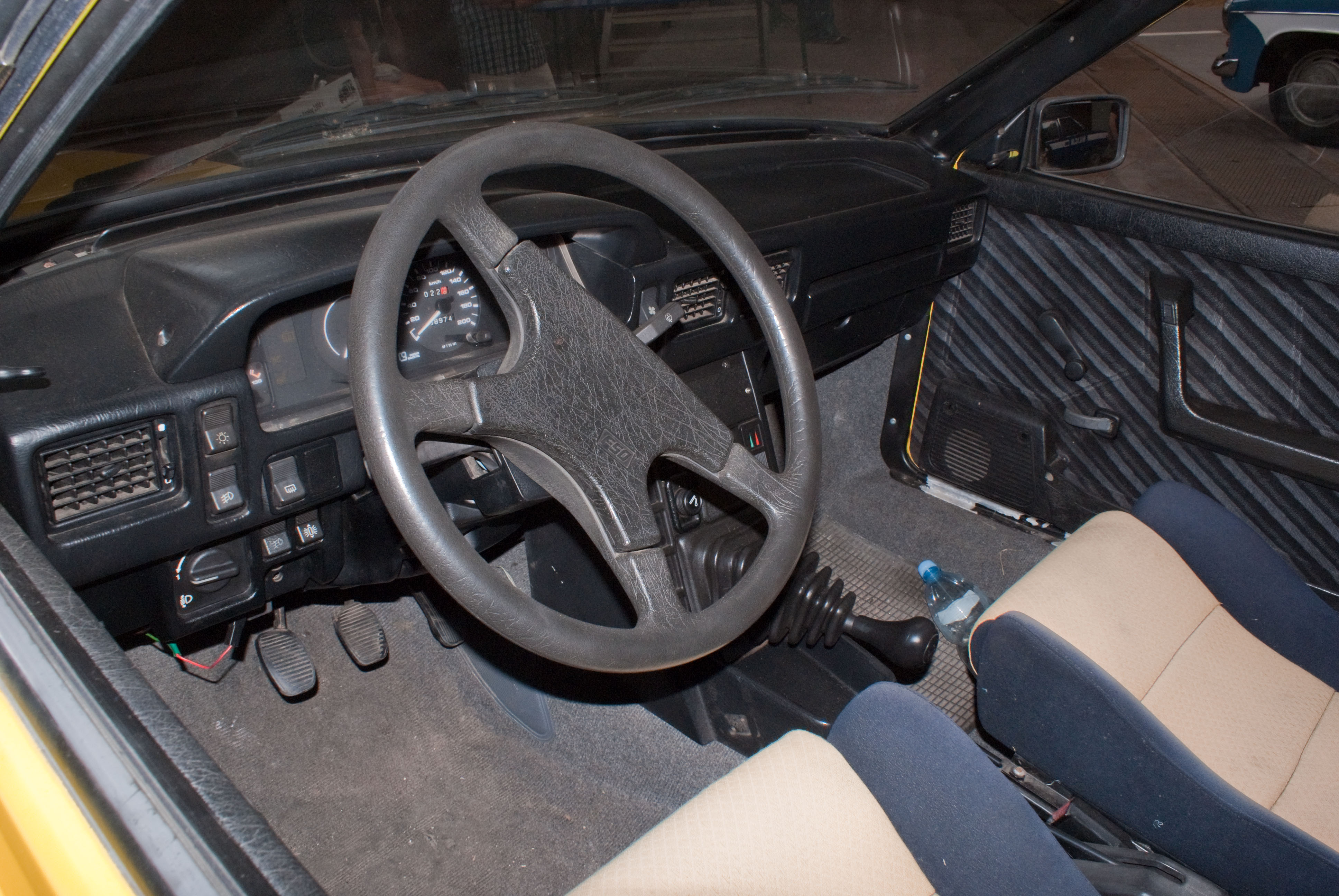 Wnętrze samochodu FSO Polonez Analog "4" z roku 1994. Egzemplarz wyposażony w silnik wysokoprężny 1,9 produkcji Citroena.Wystawa samochodów Prywatnego Muzeum Motoryzacji i Techniki w wytwórni Wódek Koneser.